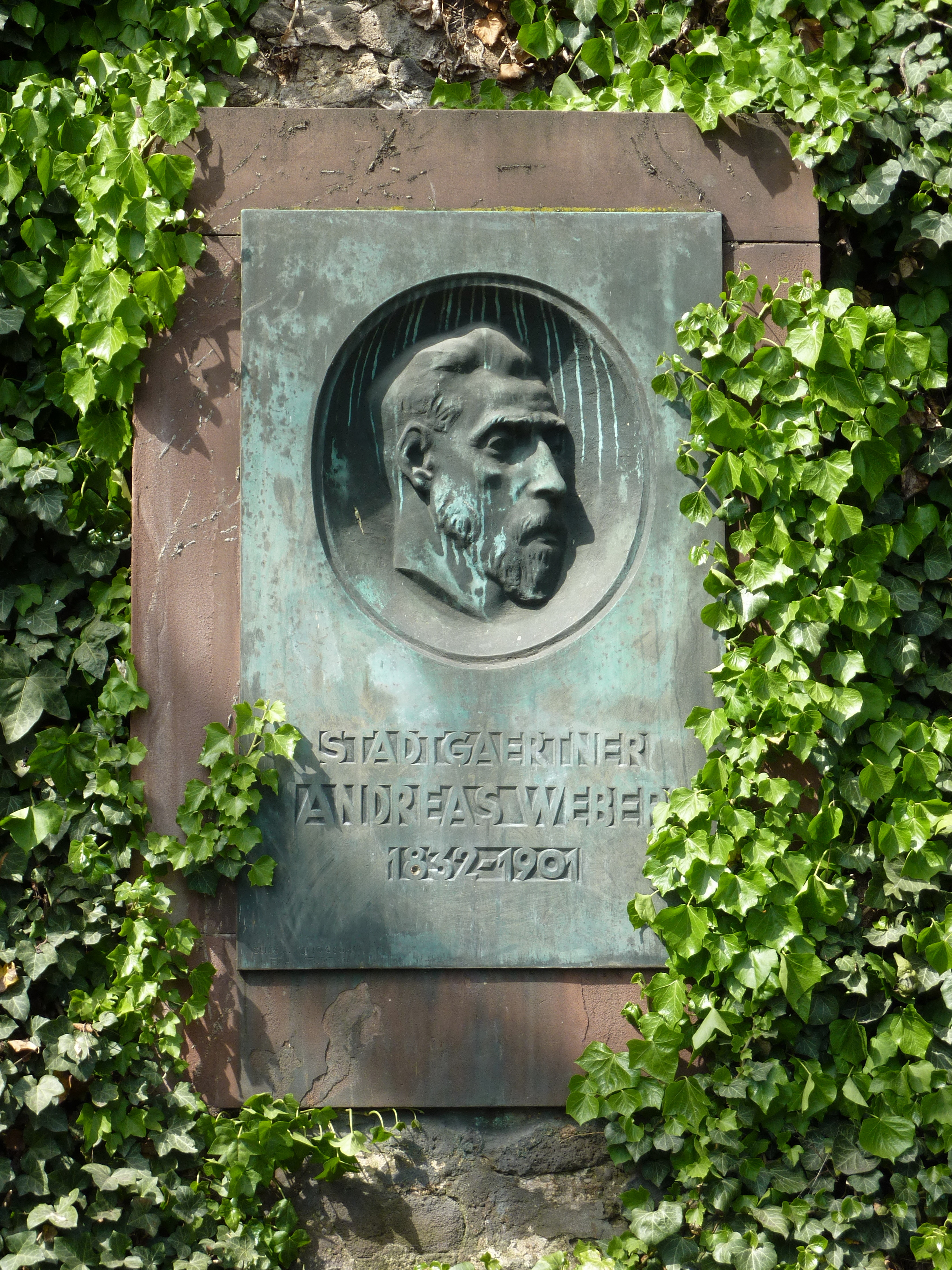 Denkmal für den Stadtgärtner Andreas Weber (1832–1901) in der Grünanlage Nizza in Frankfurt am Main. Weber war Nachfolger und Enkel des Stadtgärtners Sebastian Rinz und vollendete dessen Arbeit der Gestaltung des Nizza.